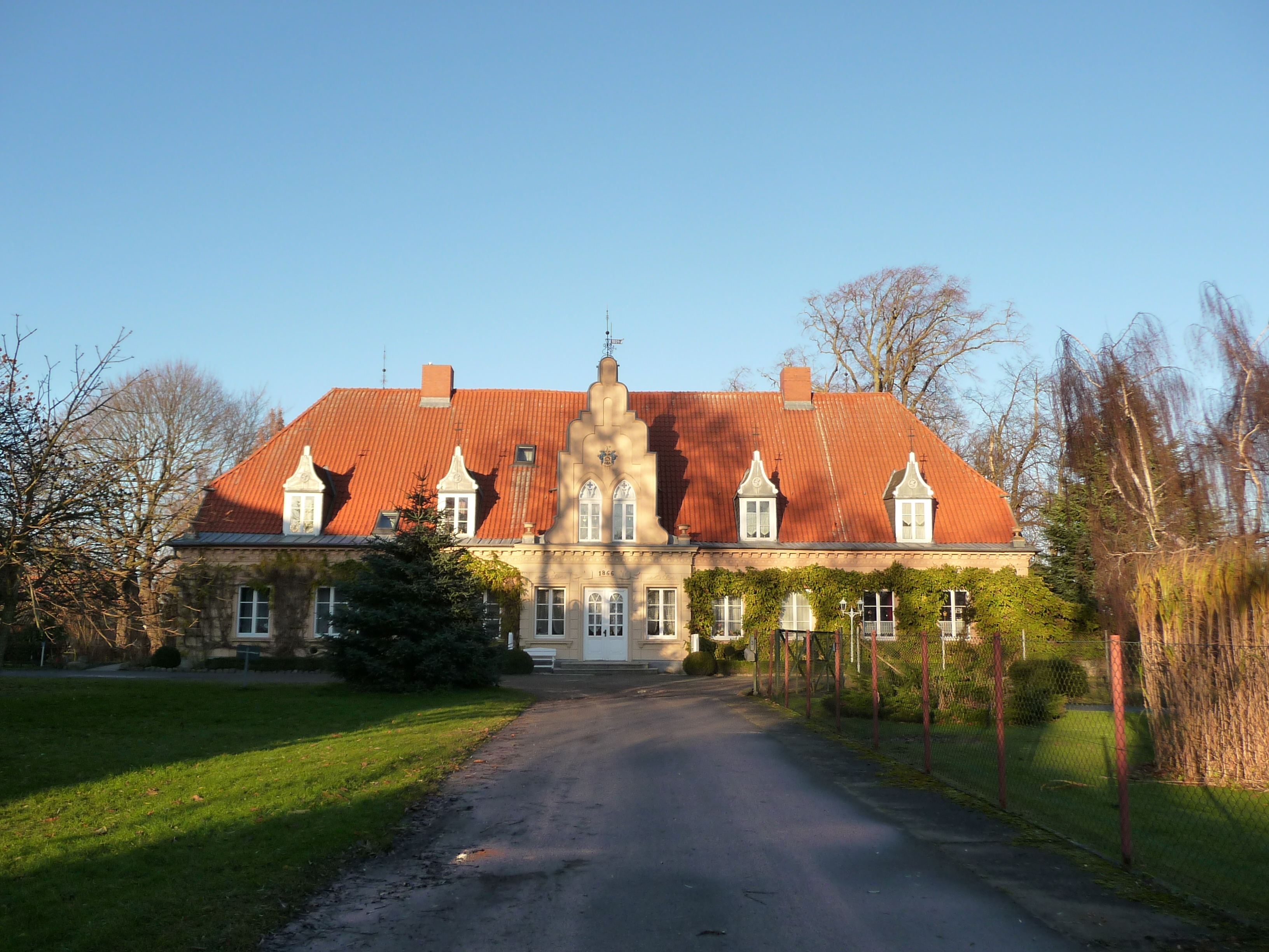 Das imposante Gutshaus in Groß Lüdershagen aus den 60er Jahren des 19.Jahrhunderts